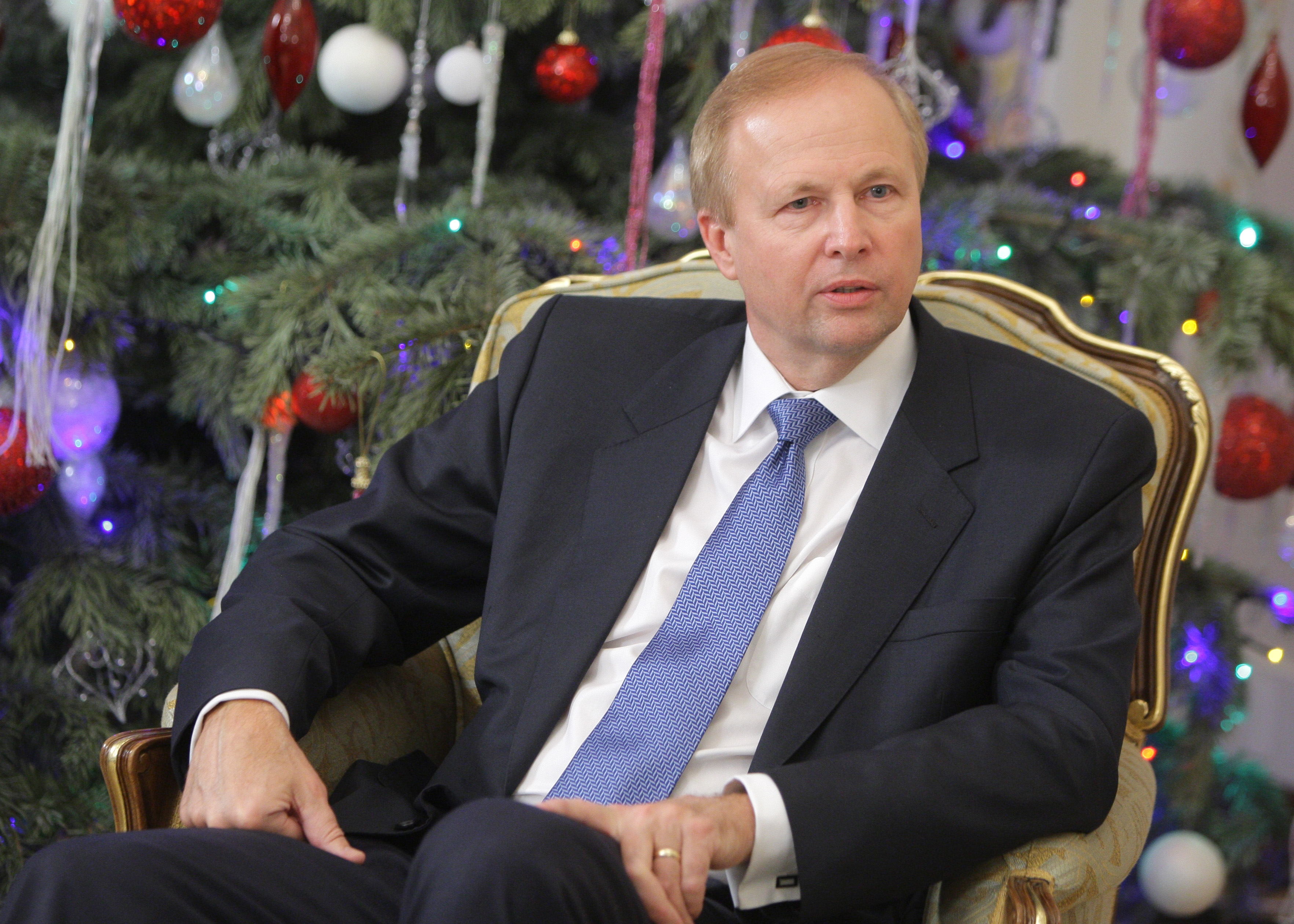 Главный исполнительный директор компании «Бритиш Петролеум» Р. Дадли во время встречи с Председателем Правительства Российской Федерации В. В. Путиным